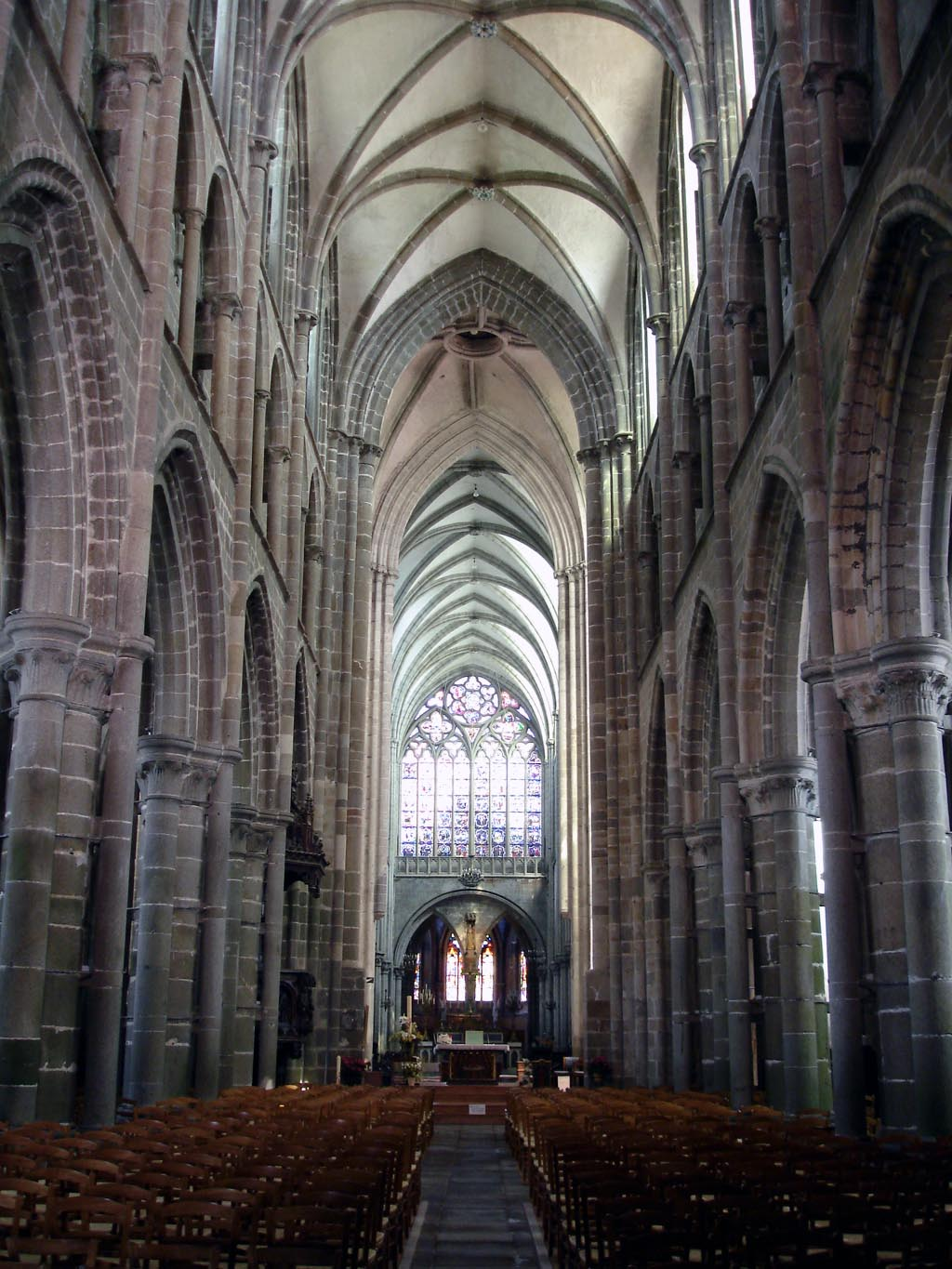 Nef de la cathédrale de Dol-de-Bretagne (Ille-et-Vilaine), France.